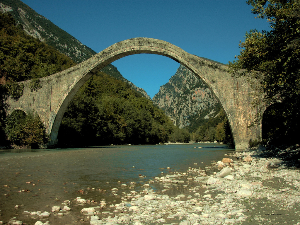 Plaka bridge